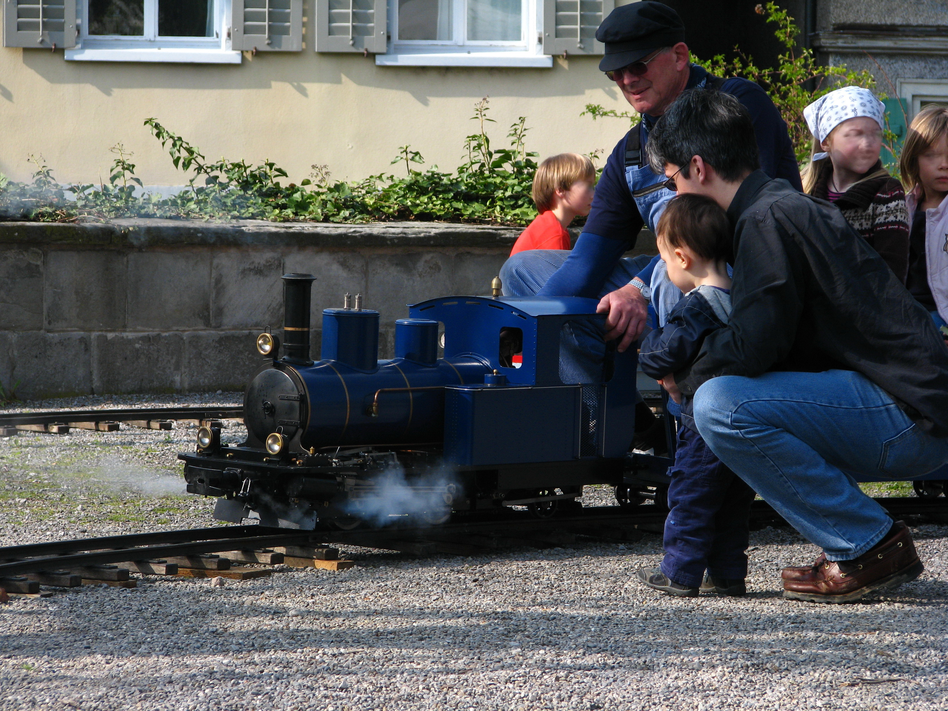 Lindenhof plaza in Zürich (Switzerland) on Saturday before Sechseläuten in April 2010